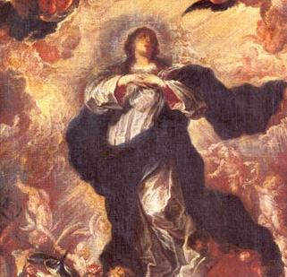 detail